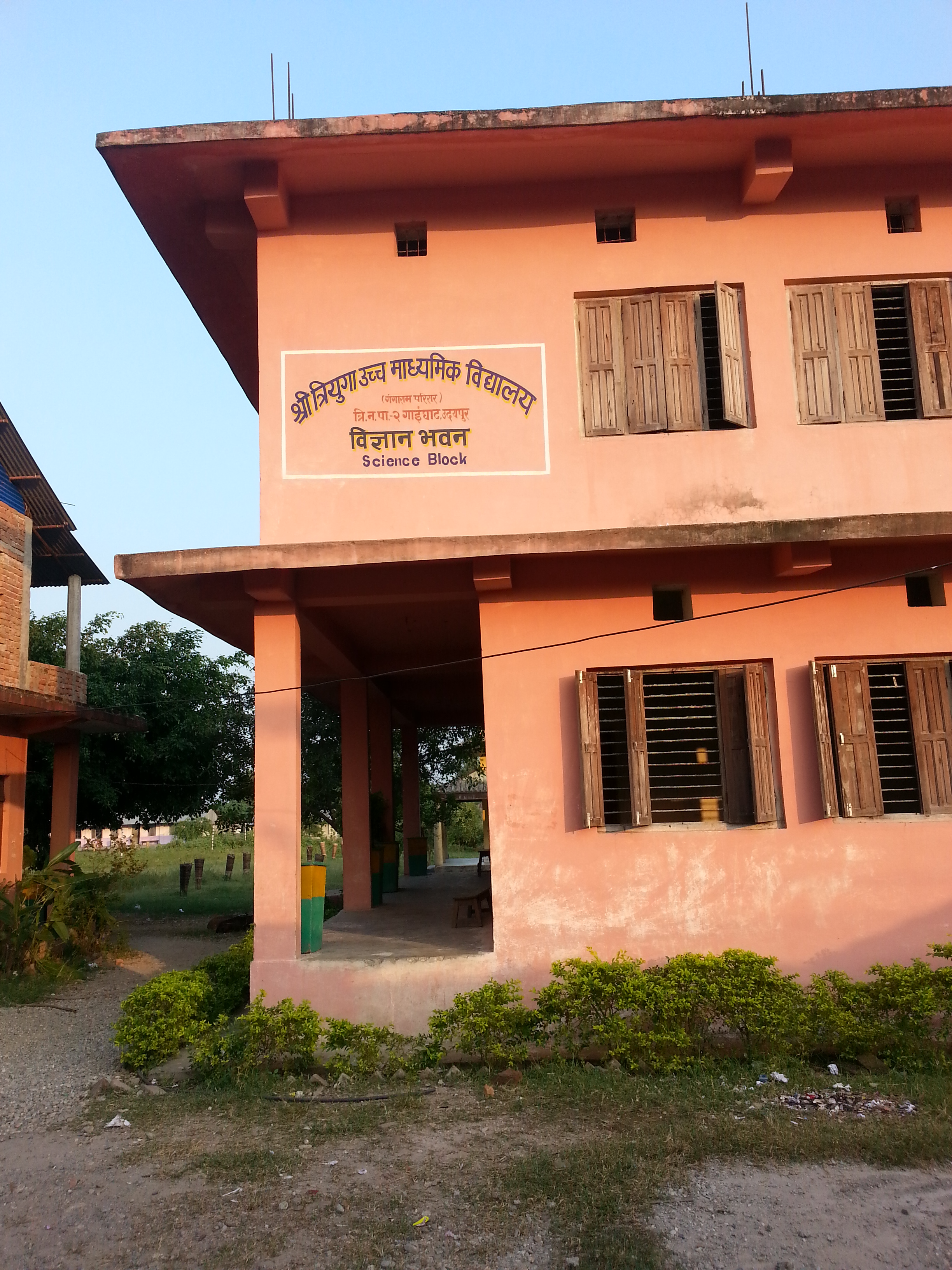 नेपाली: त्रियुगा माध्यमिक विद्यालय, गाईघाट